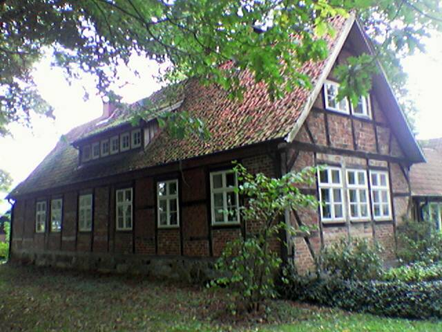 Seevetal